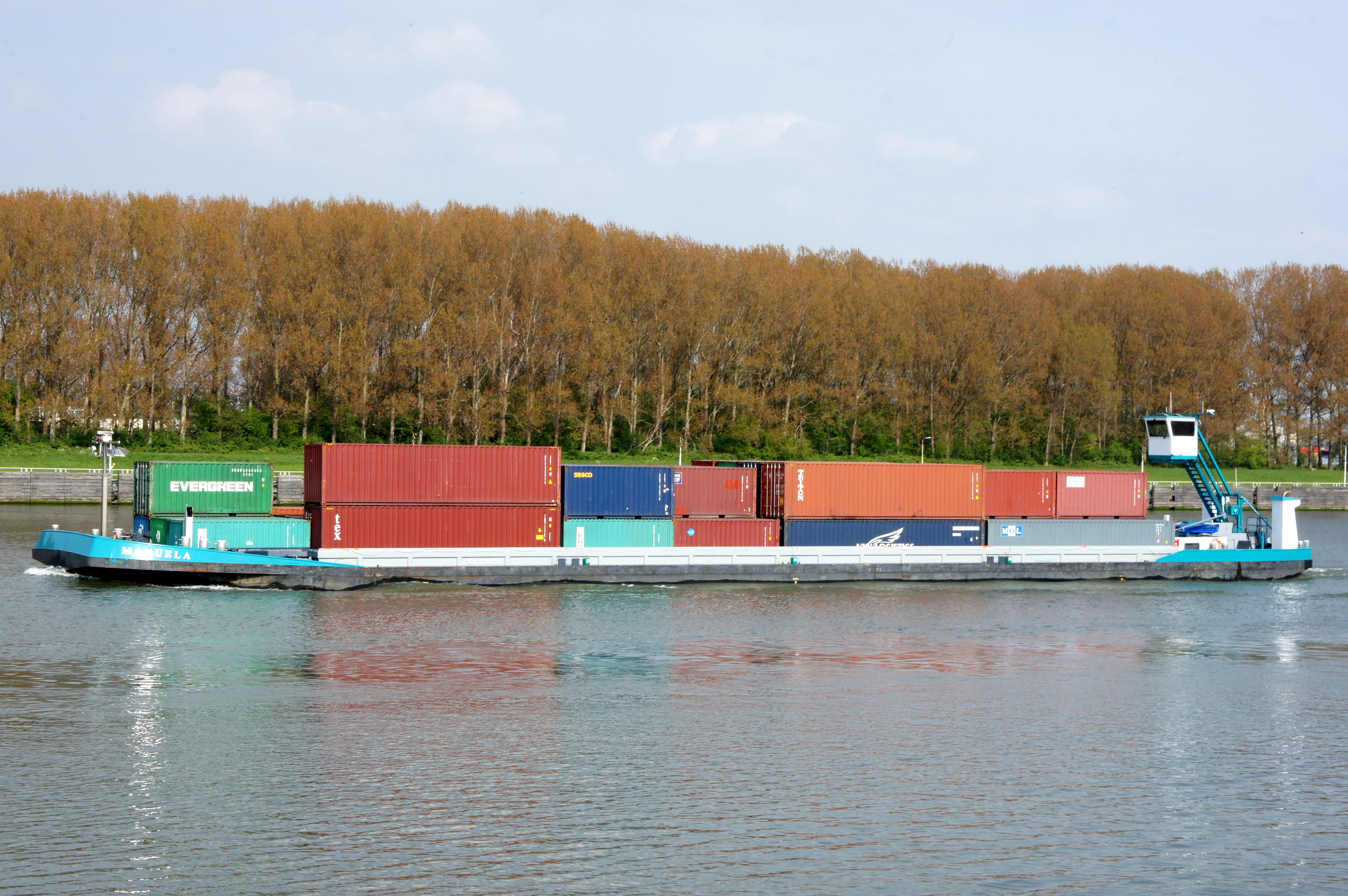 Manuela - ENI 02318590, Hartelkanaal, Port of Rotterdam.